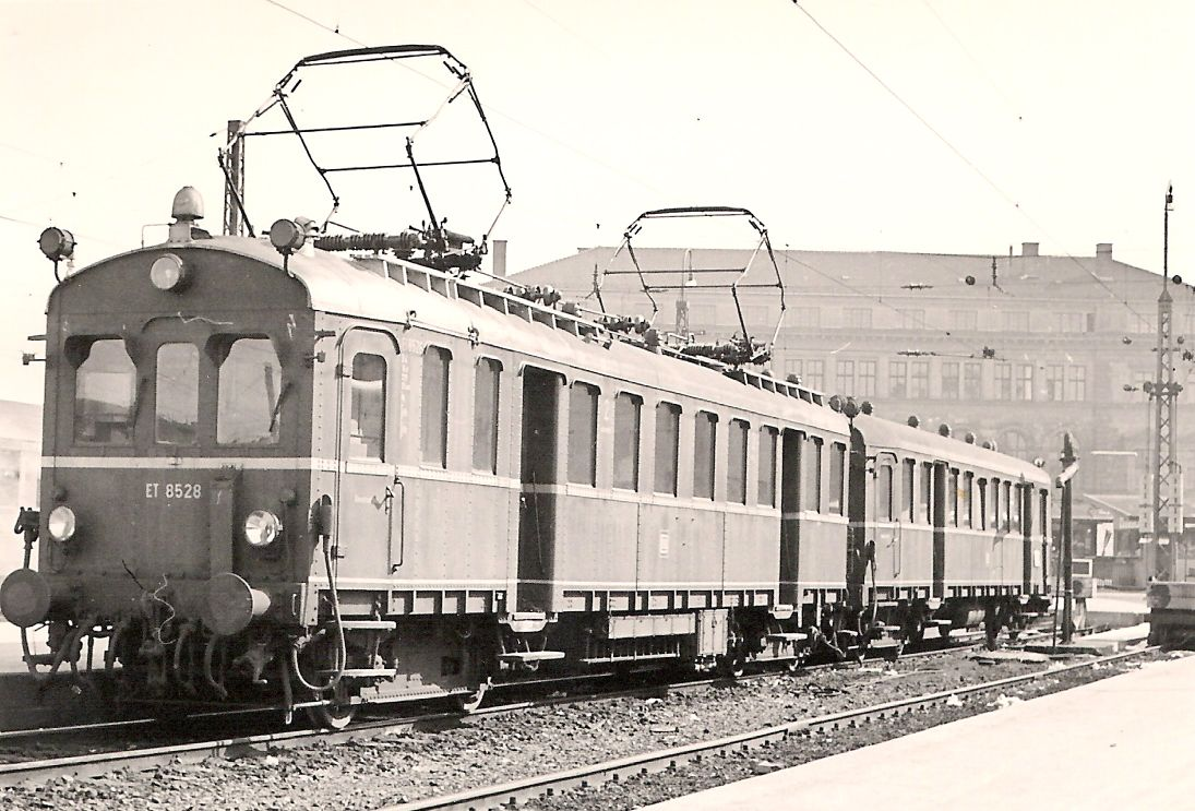 Triebzug ET/ES 85 28 in München Hbf